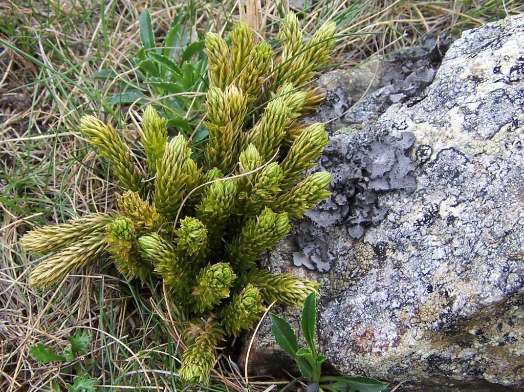 Lycopodium selago = Huperzia selago (pl. wroniec widlasty), habitat:Tatra Mountains, Hala Upłaz